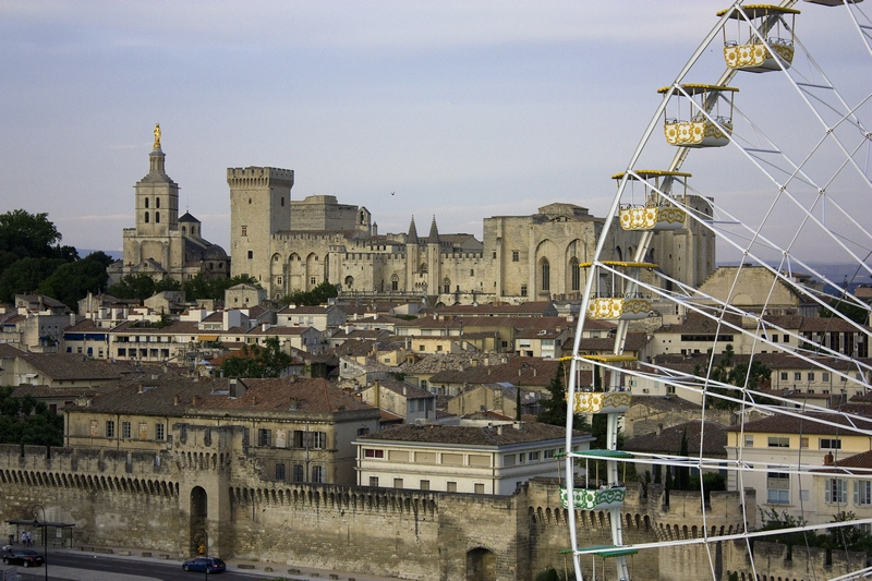 Avignon, Palais de Papes, Photo prise par ballon captif par Paul-Louis FERRANDEZ de la société MEROPS-Photo